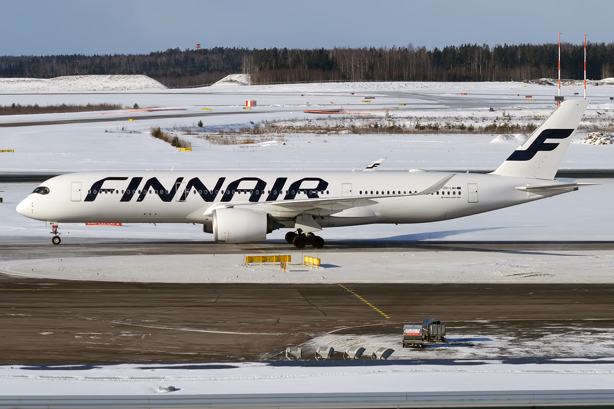 Finnair, OH-LWH, Airbus A350-941